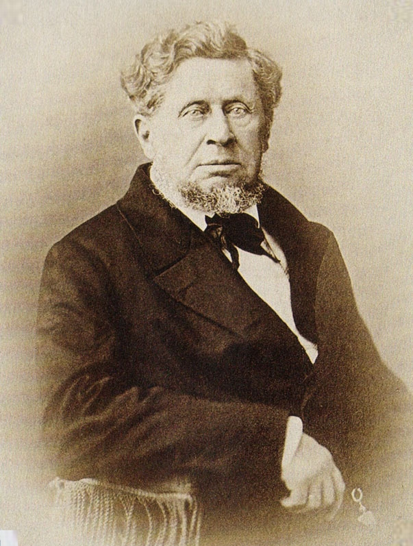 Тургенев, Николай Иванович. Париж. 1860-е годы